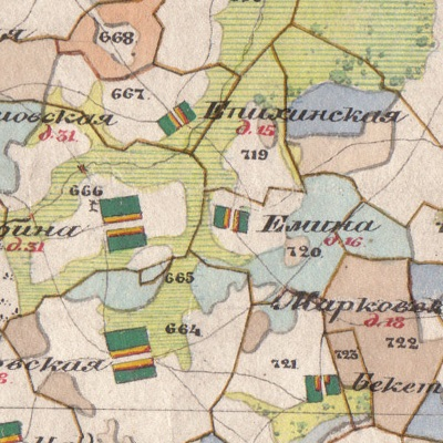 Деревня Емино на карте 1850 года